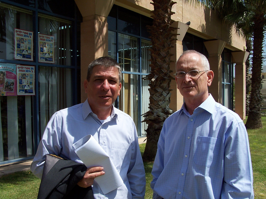 צילום: עידו קינן, חדר 404 (cc-by-sa)